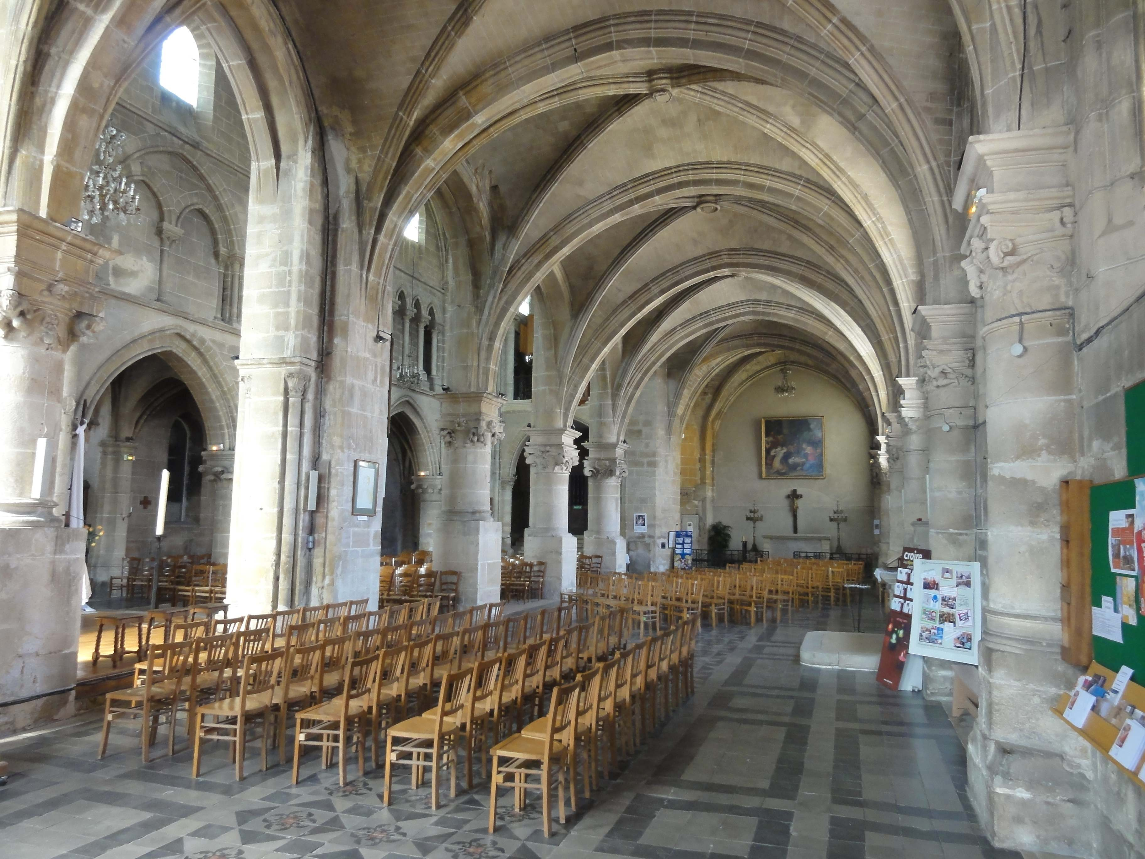 Intérieur de l'église - voir titre.